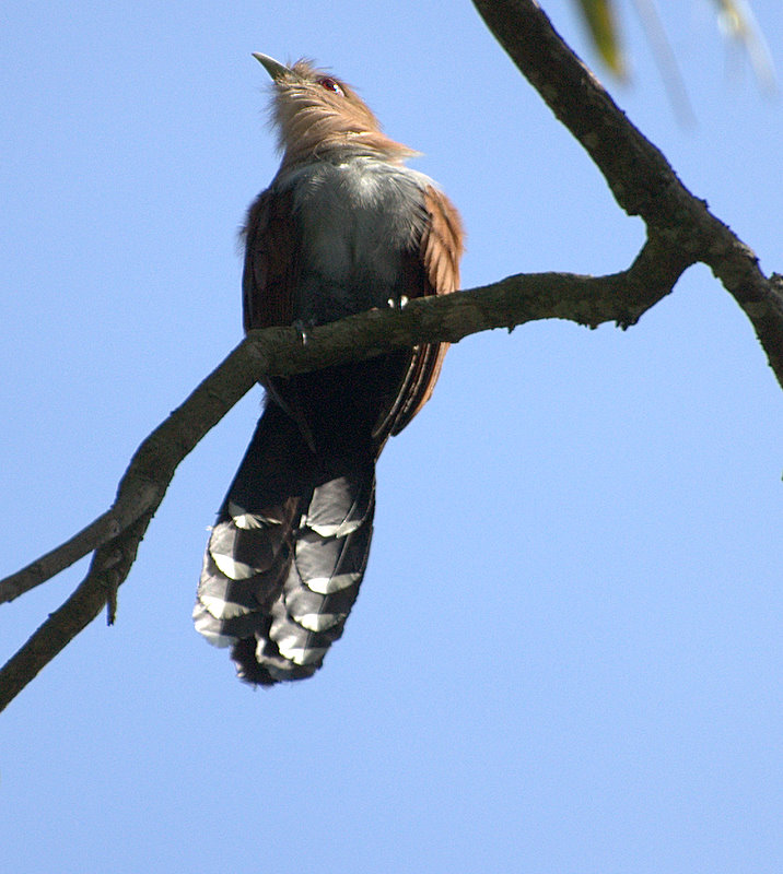 Piaya cayana, Jardim Botânico de São Paulo